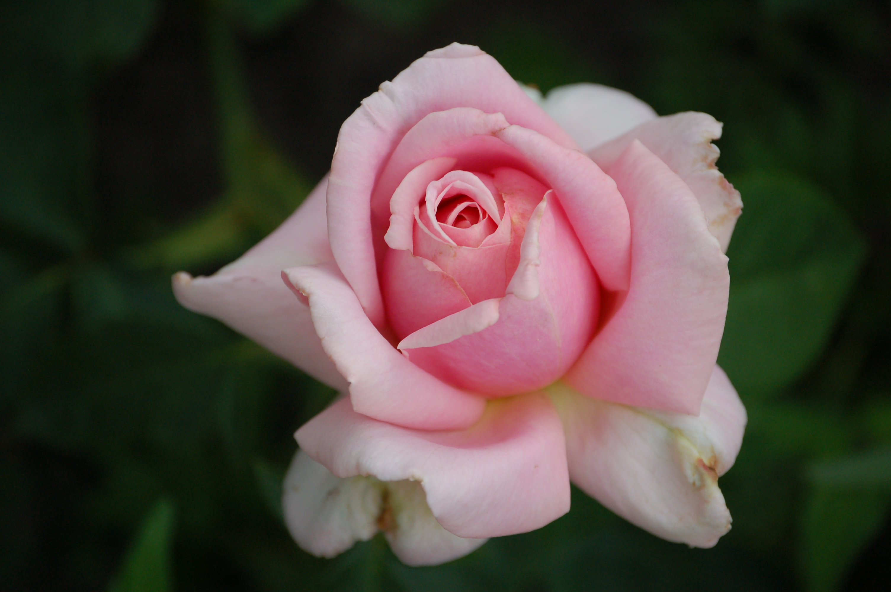 Rosa 'Frederic Mistral'